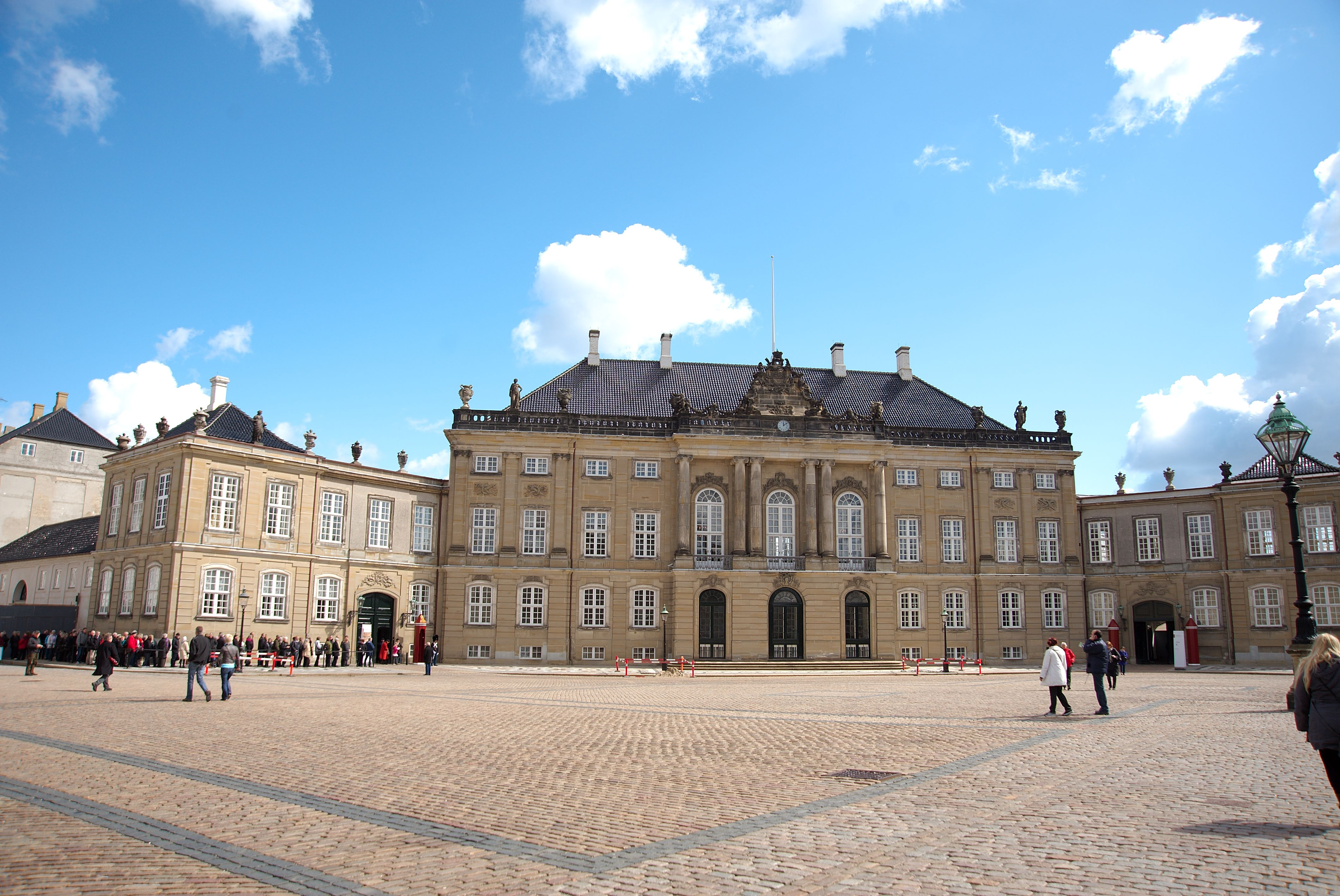 Amalienborg